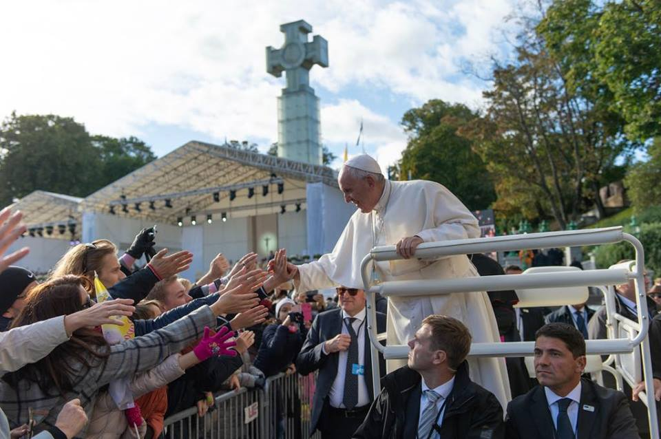 Paavst Franciscuse visiit Eestisse 25.09.2018